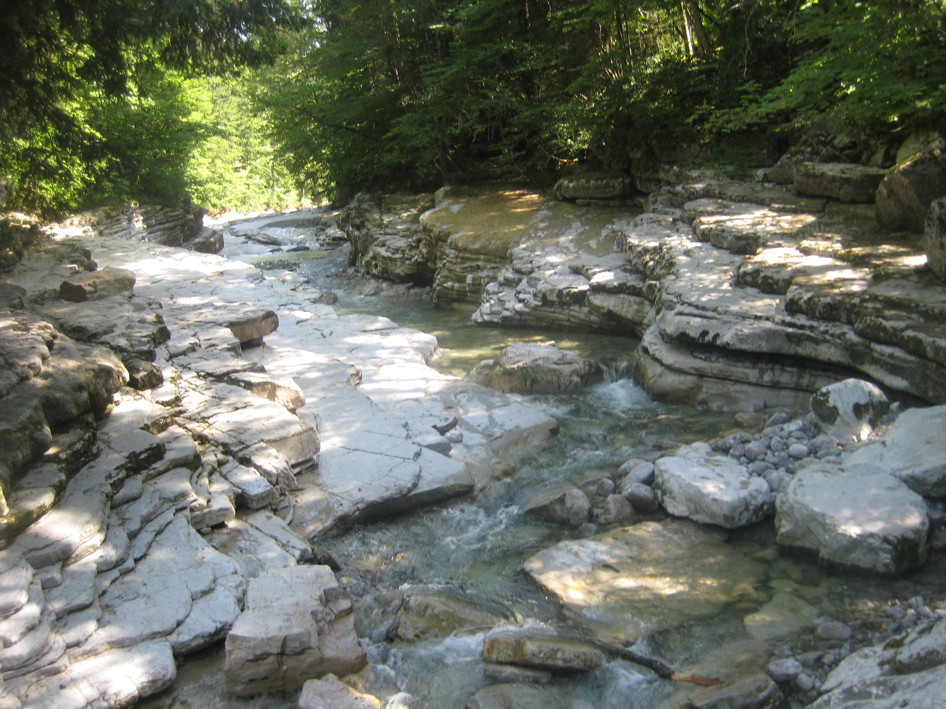 Naturschutzgebiet und Europaschutzgebiet Tauglgies zwischen Kuchl und Vigaun